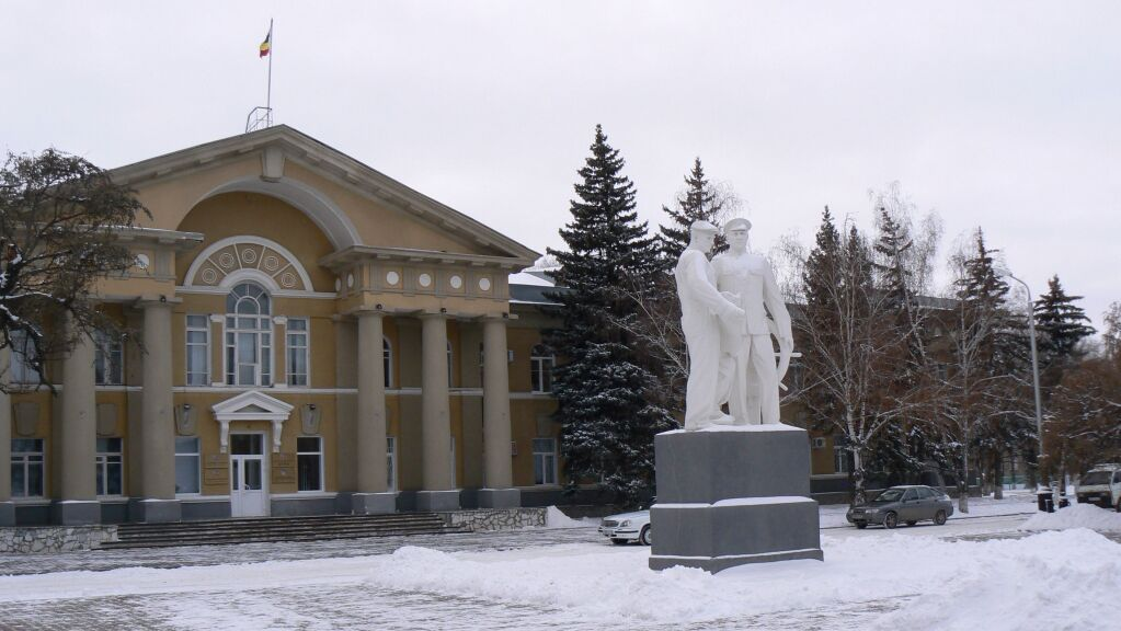 Здание администрации Волгодонска и Волгодонской городской думы